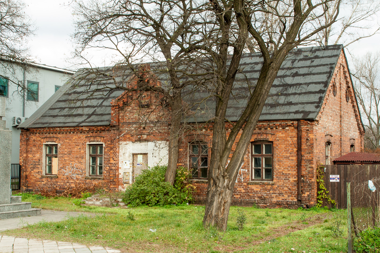 Murowanka czyli dawna szkoła w Wawrze. ul. Płowiecka 77, Warszawa